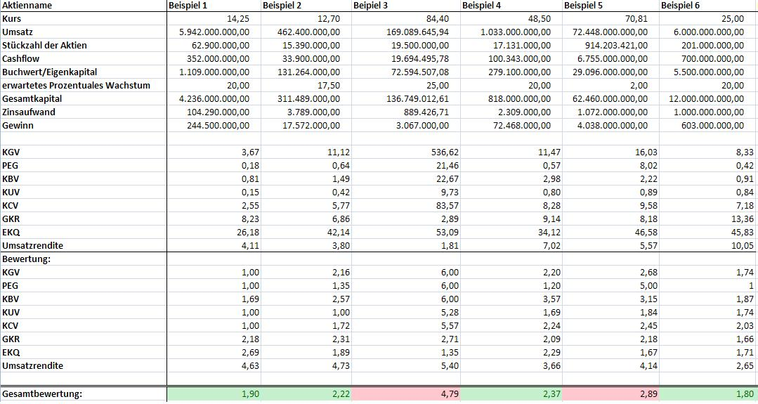 Beispiel einer Fundamentalanalyse